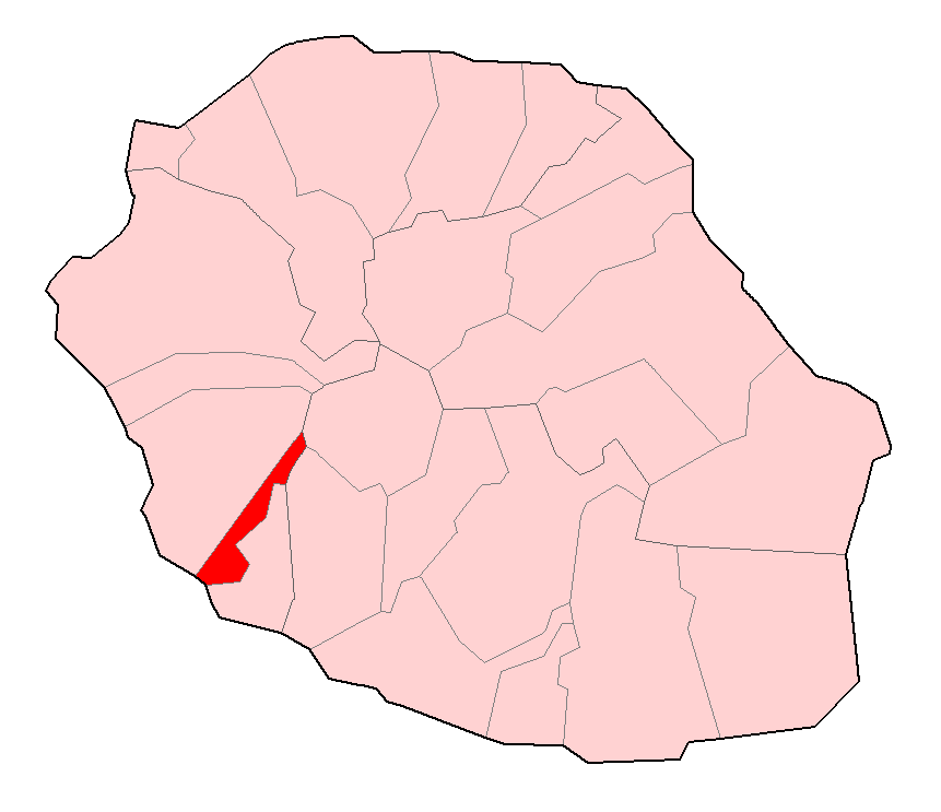 Carte de la Réunion permettant de localiser Les Avirons.